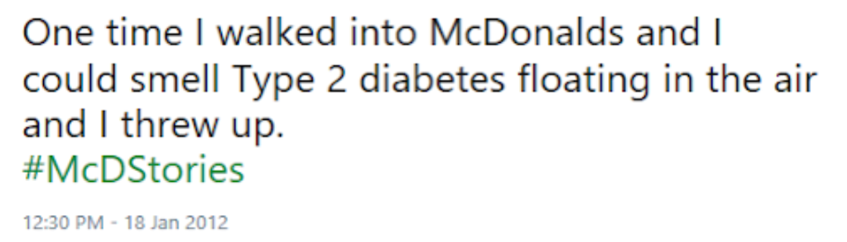 Raillerie du hashtag #McDStory